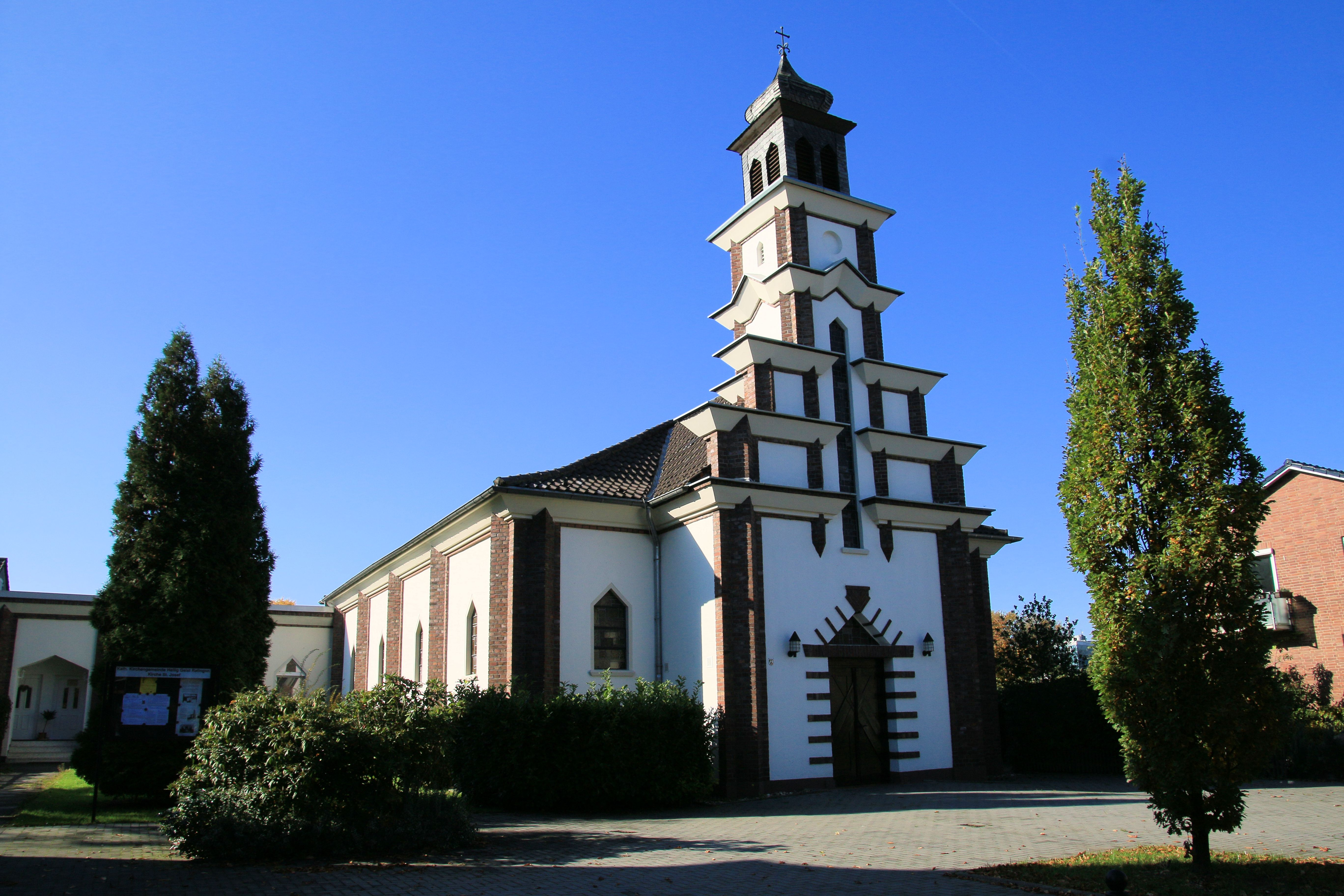 Ratingen St.Josef Kirche